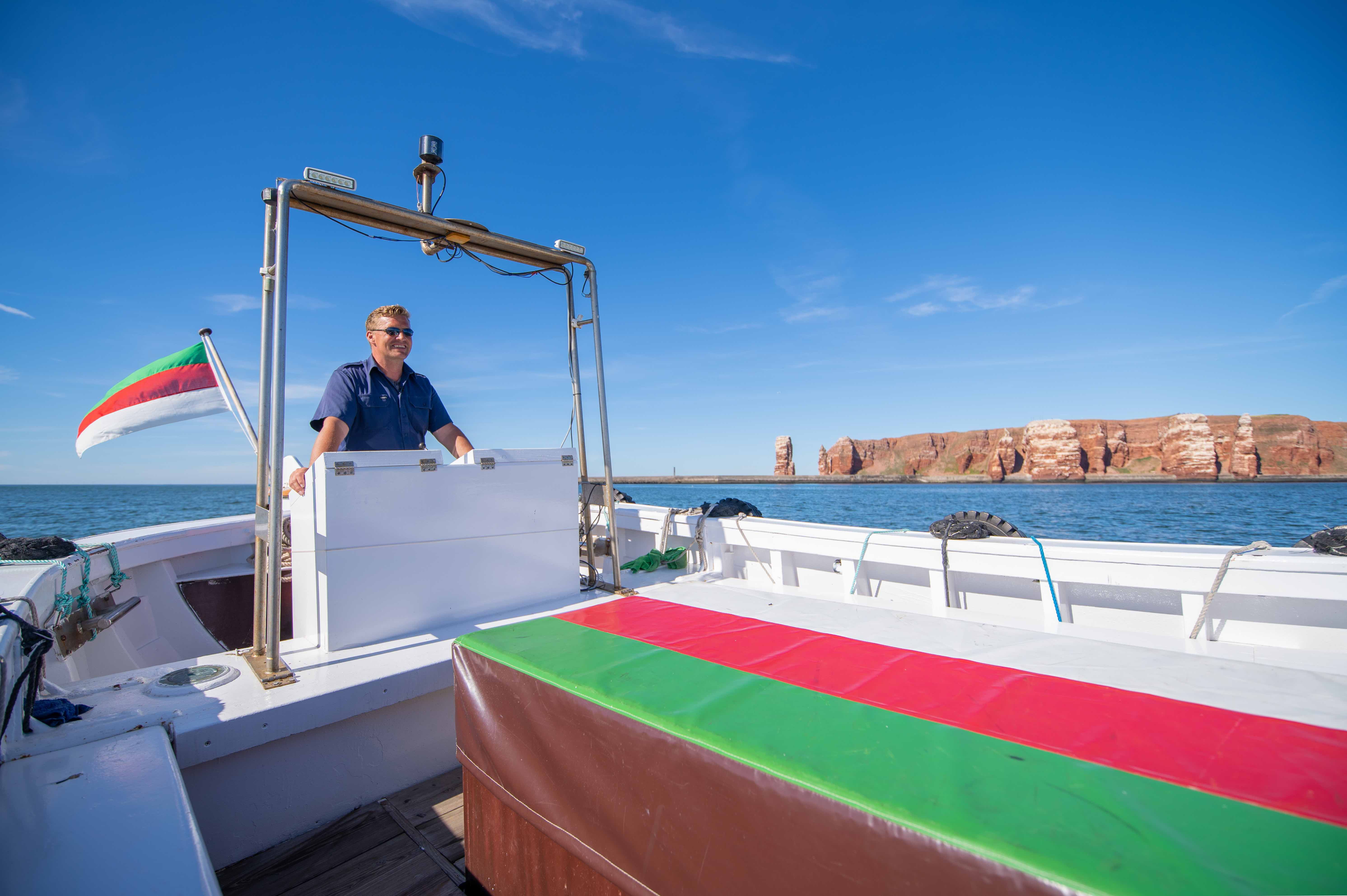 Das Helgoländer Börteboot "Rasmus", während einer Inselrundfahrt mit Eigner Sven Köhn. Im Hintergrund ist das Wahrzeichen der Insel, die Lange Anna, zu sehen.